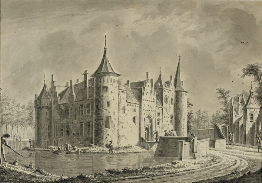 Afbeelding van gezicht op Kasteel Helmond; Titel: Het huijs te Helmond; vervaardigd tussen ca 1768-1786; door topografisch tekenaar Dirk Verrijk (1734-1786); sepia, grafiek; inkt, papier; hoogte: 24,0 cm, breedte: 34,0 cm